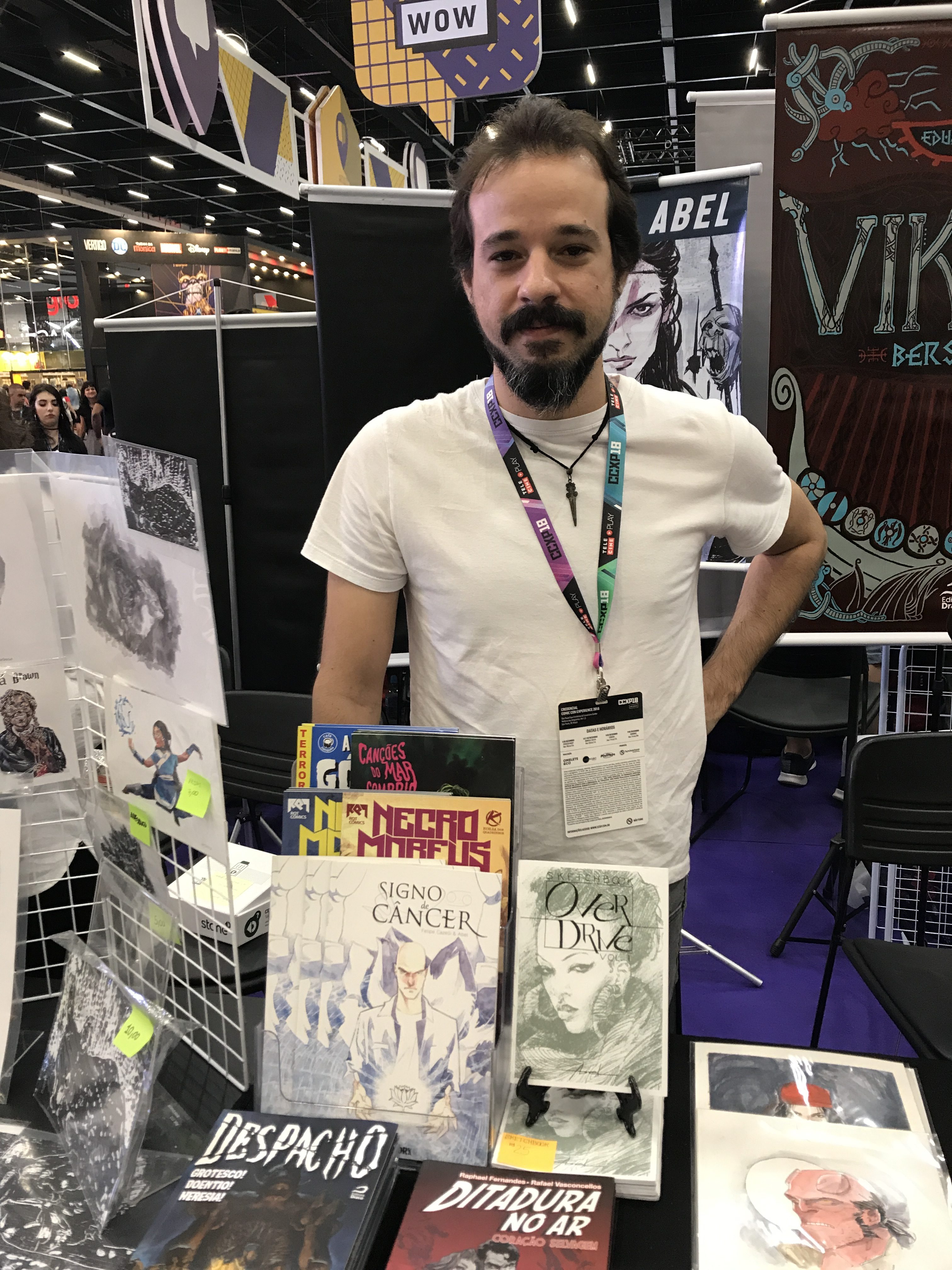 Artista Rafael Vasconcellos (Abel) na edição de 2018 da Comic Con Experience.